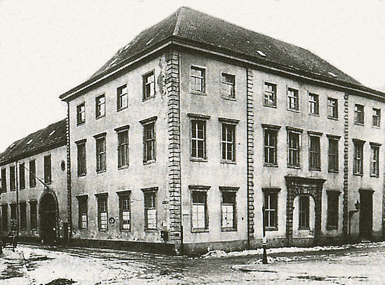 Hundheimsches Palais, links Tor Akademiestraße 1, rechts Seite zur Dammstraße